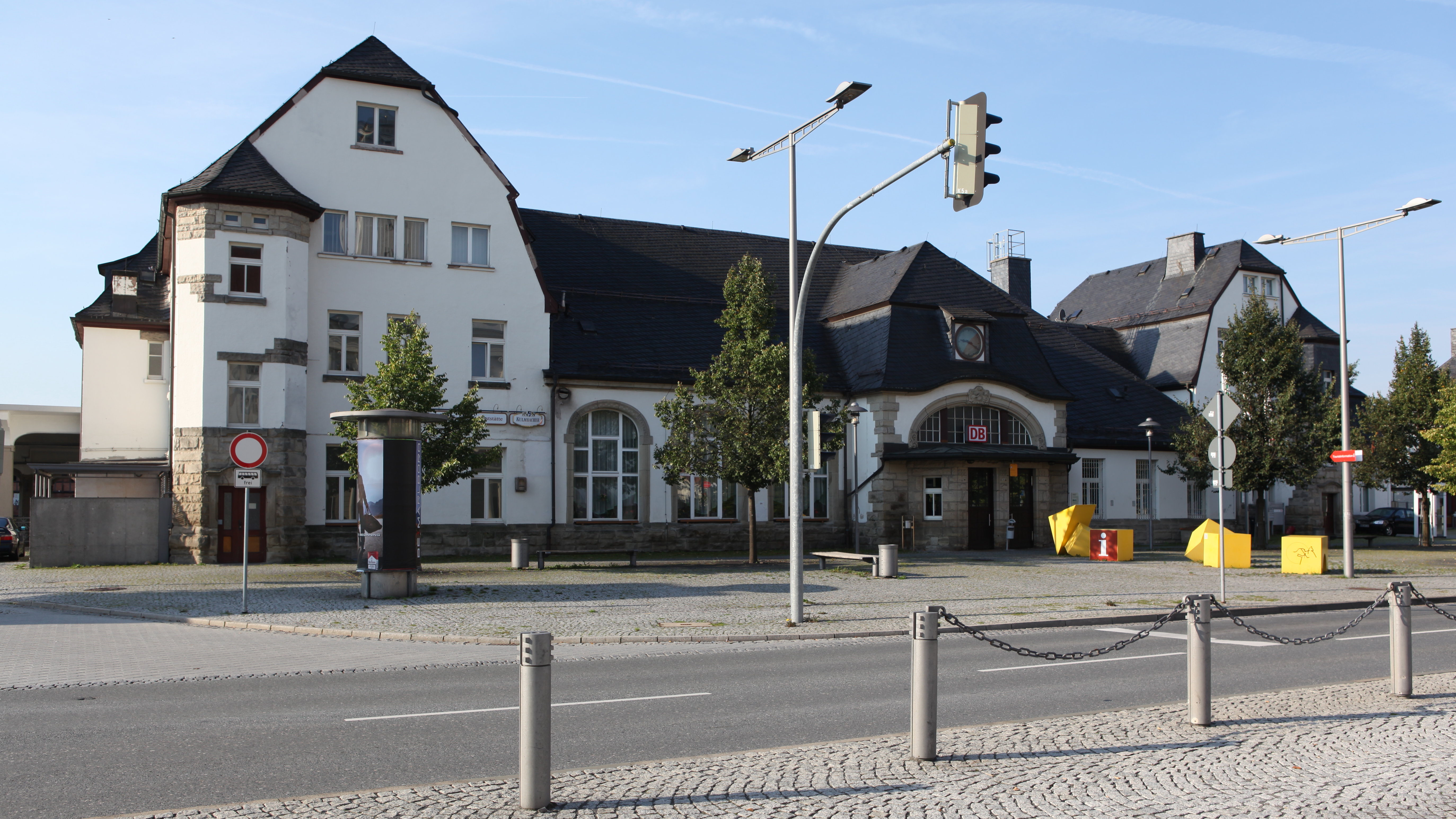 Empfangsgebäude des Hauptbahnhofs, erbaut 1905-07, Sonneberg, Bahnhofsplatz 3